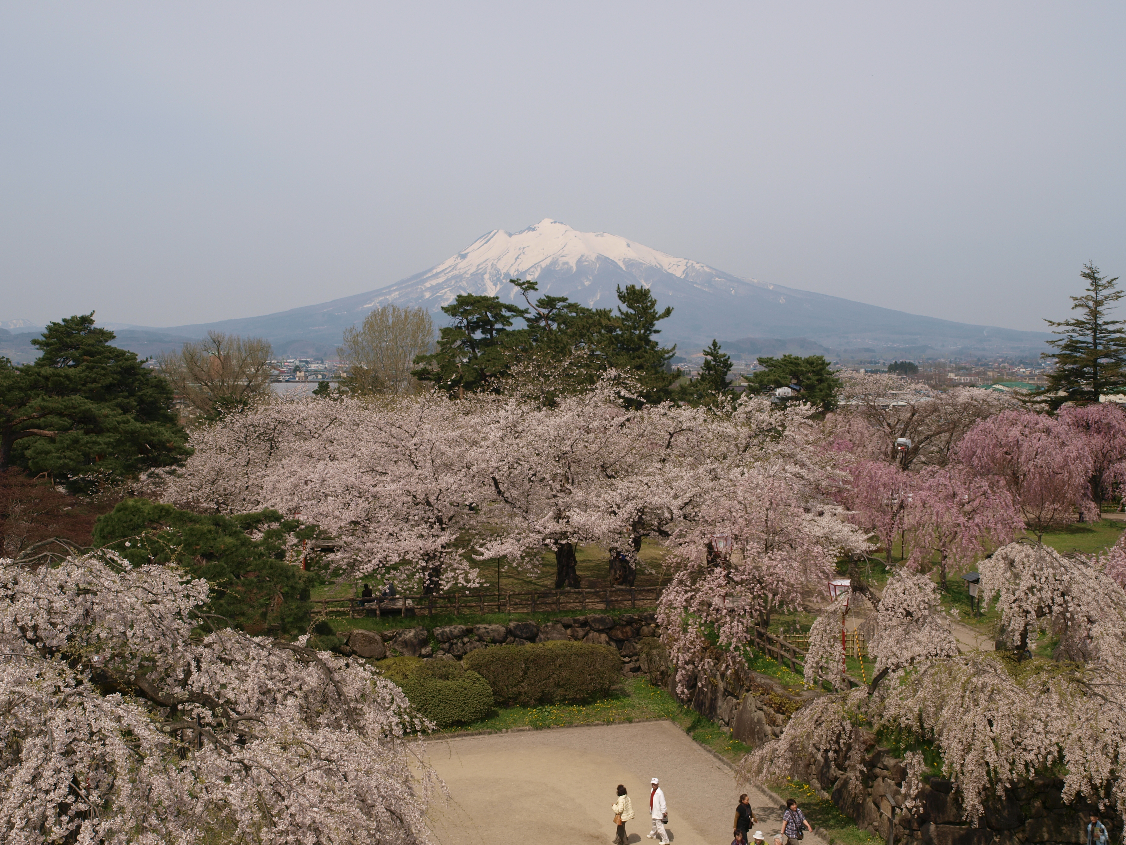 弘前城より望む岩木山